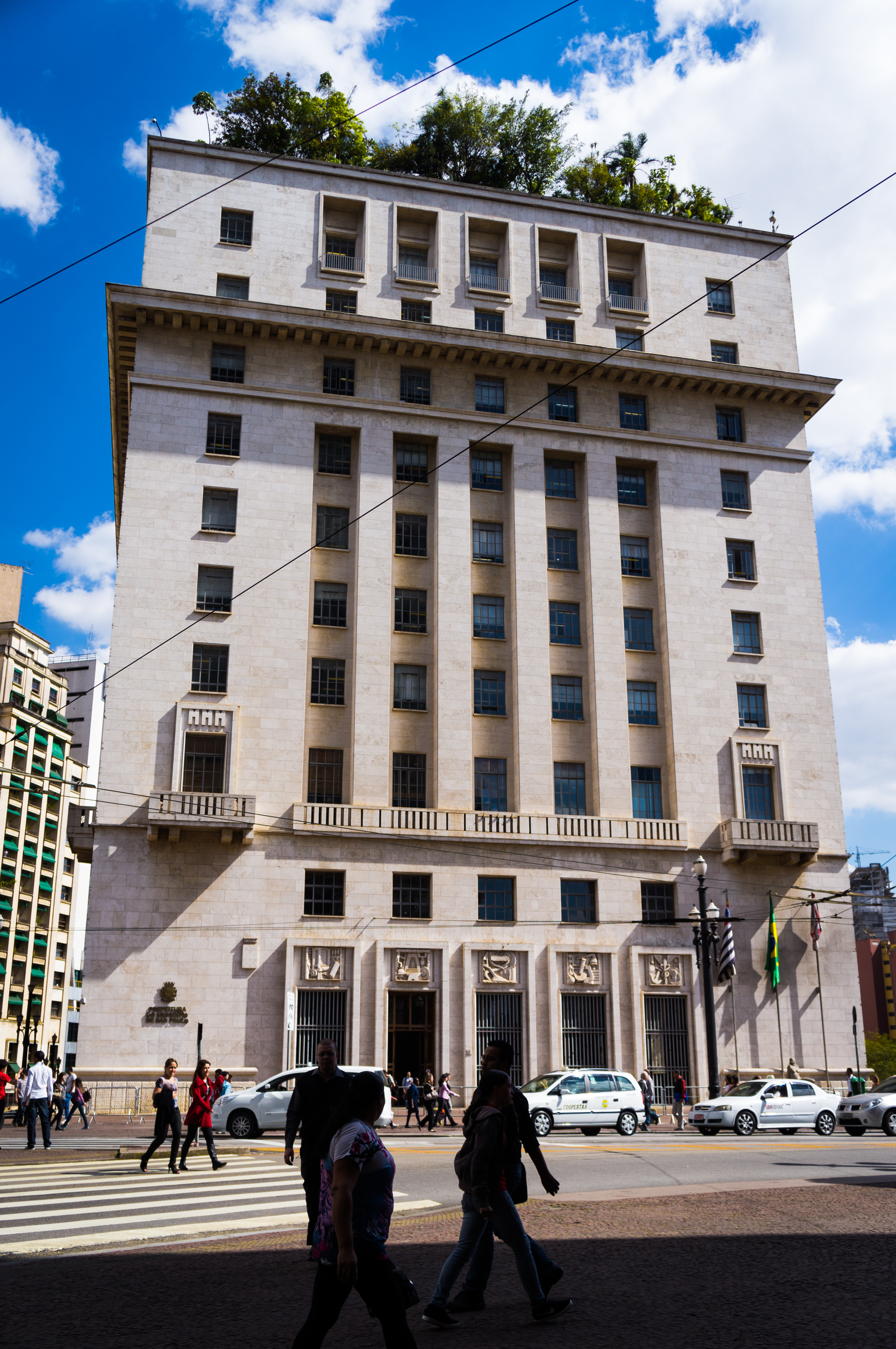 Fachada do Edifício Matarazzo, a sede da Prefeitura de São Paulo, Brasil.